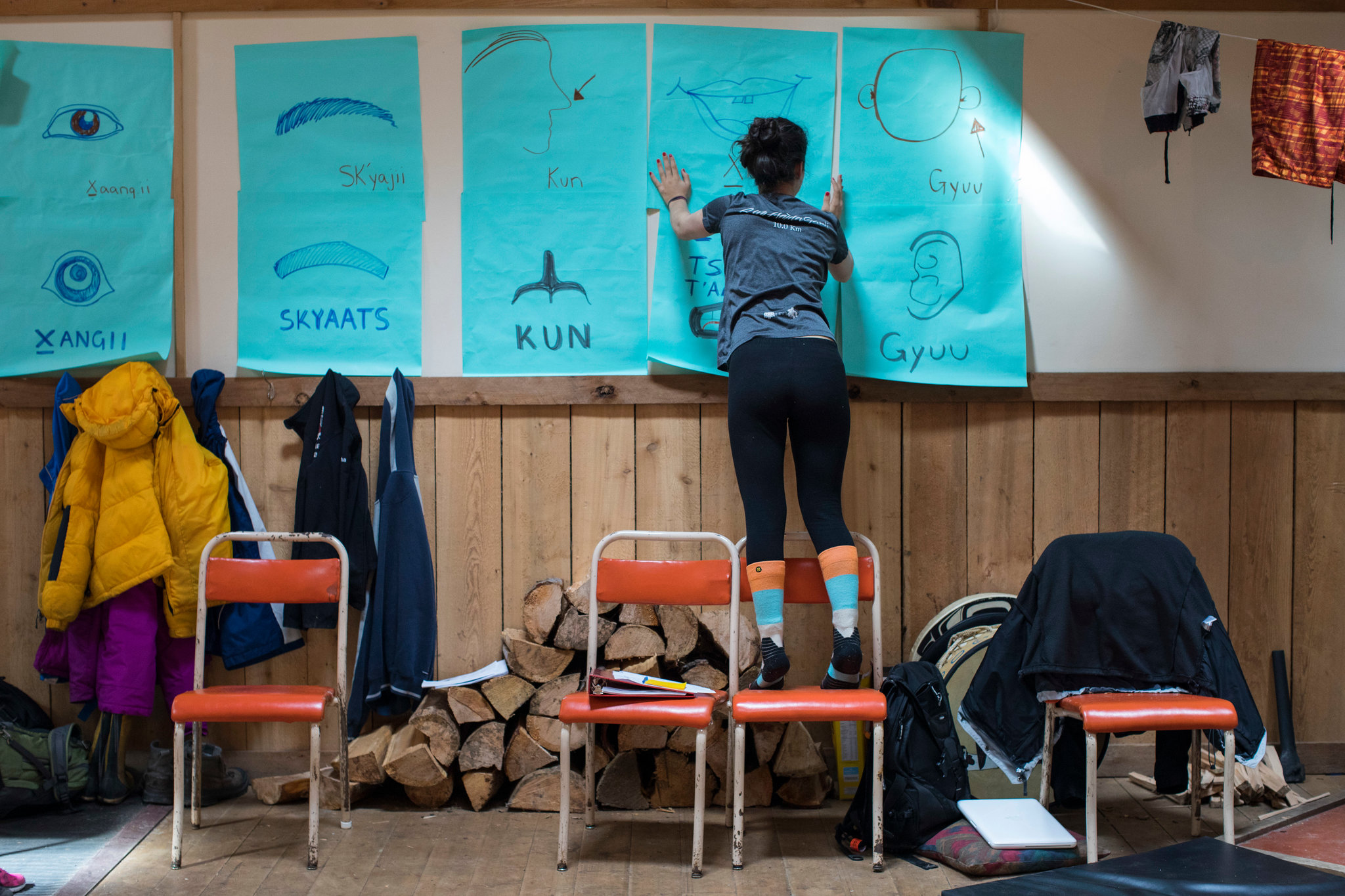 Примеры слов с иллюстрациями из местной школы